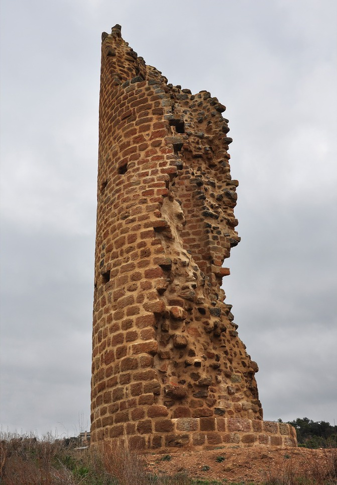 La torre del castell un cop restaurada